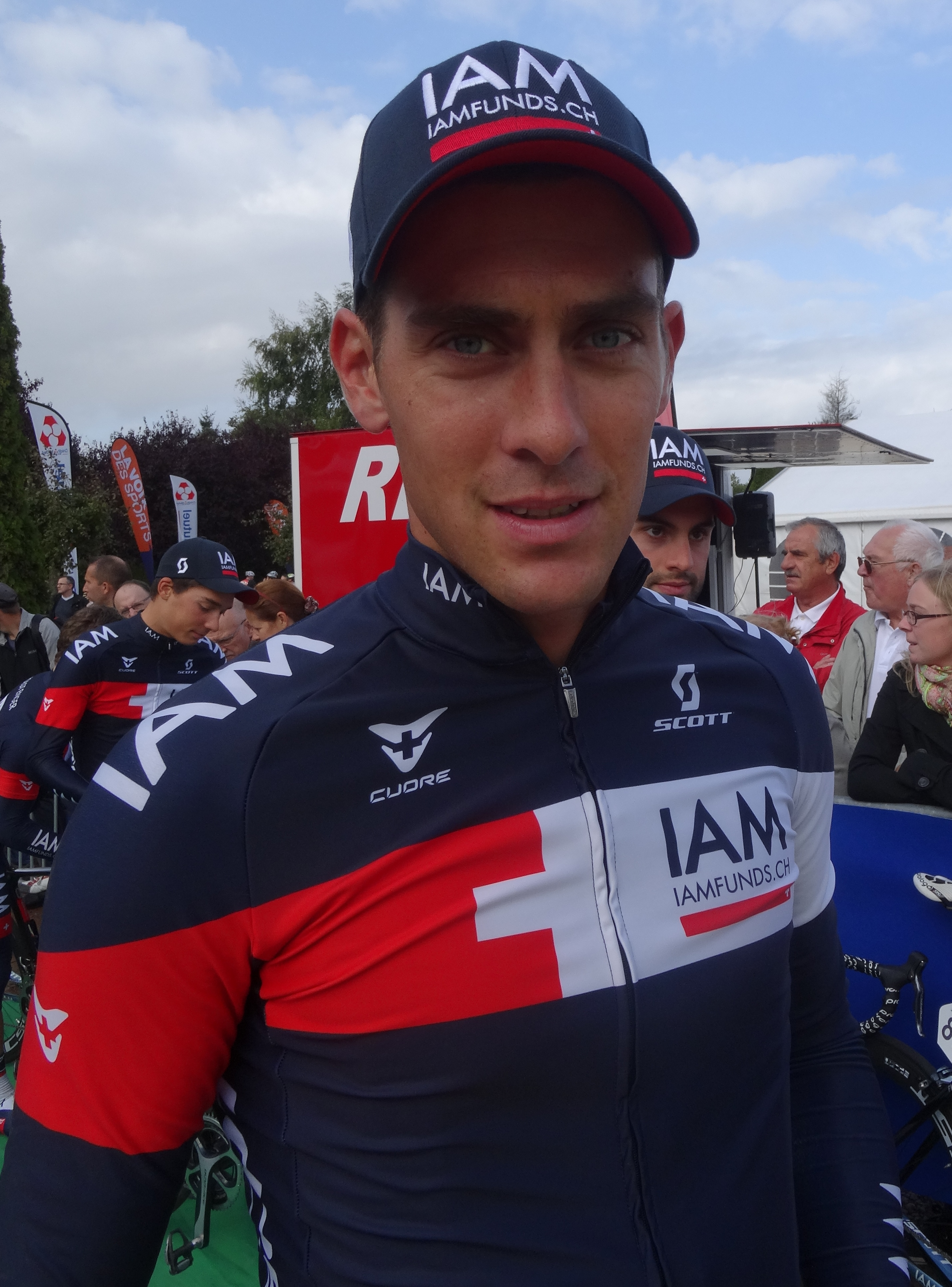 Reportage réalisé le dimanche 21 septembre à l'occasion du départ et de l'arrivée du Grand Prix d'Isbergues 2014 à Isbergues, Nord-Pas-de-Calais, France.